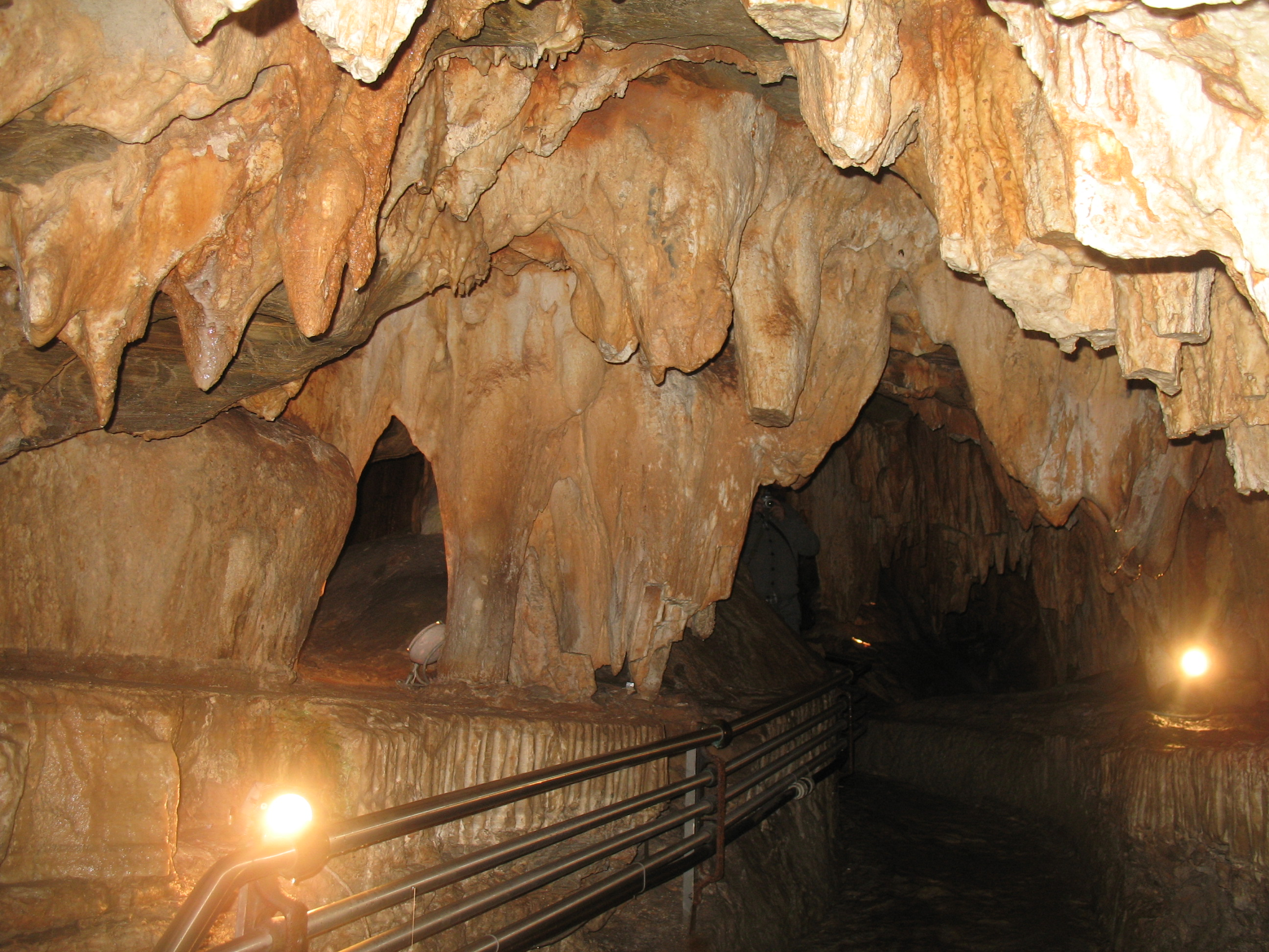 Grotte di Toirano, a Toirano, Savona, Liguria, Italia